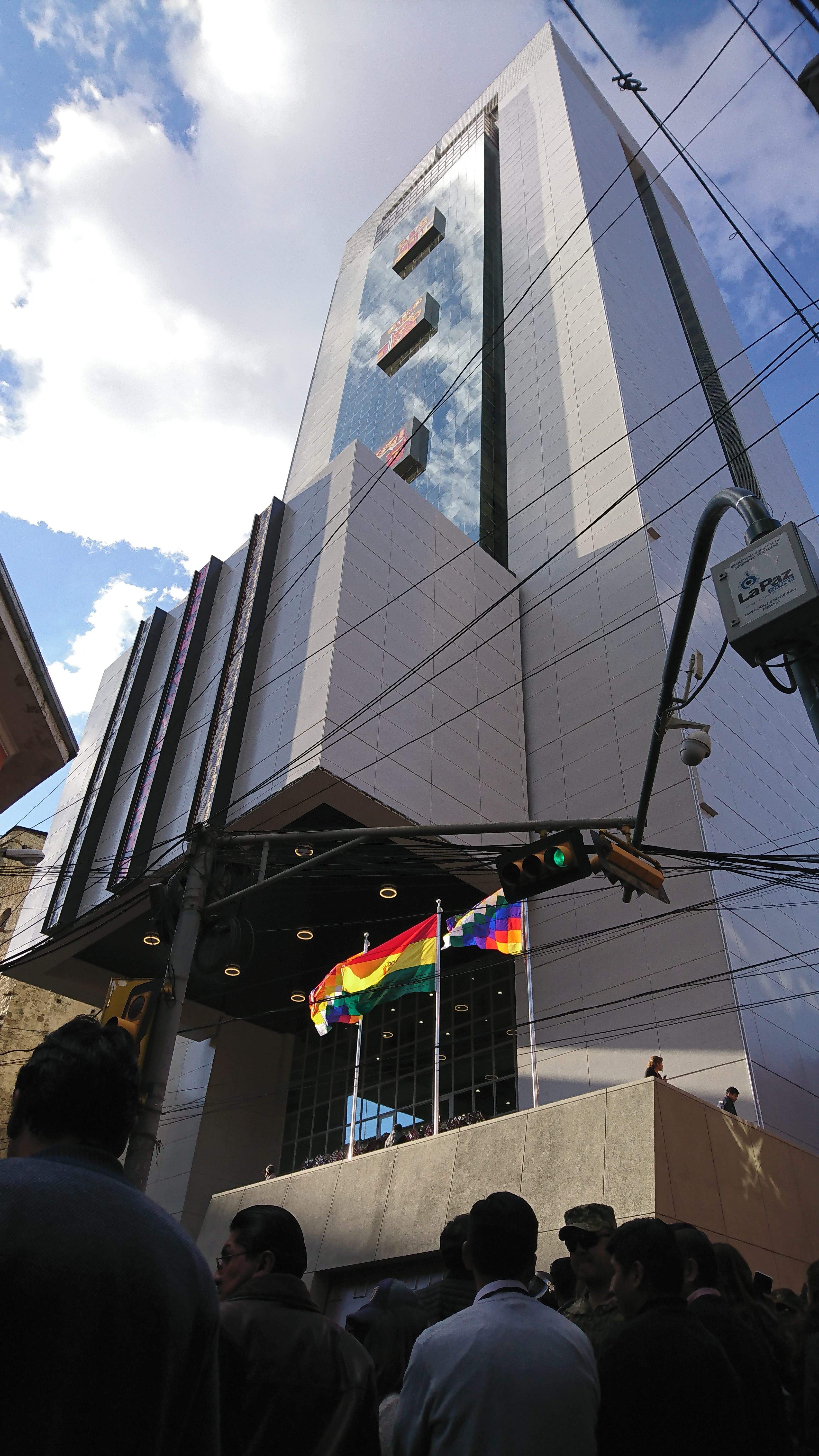 Ingreso a la Casa Grande del Pueblo, desde la calle Ayacucho